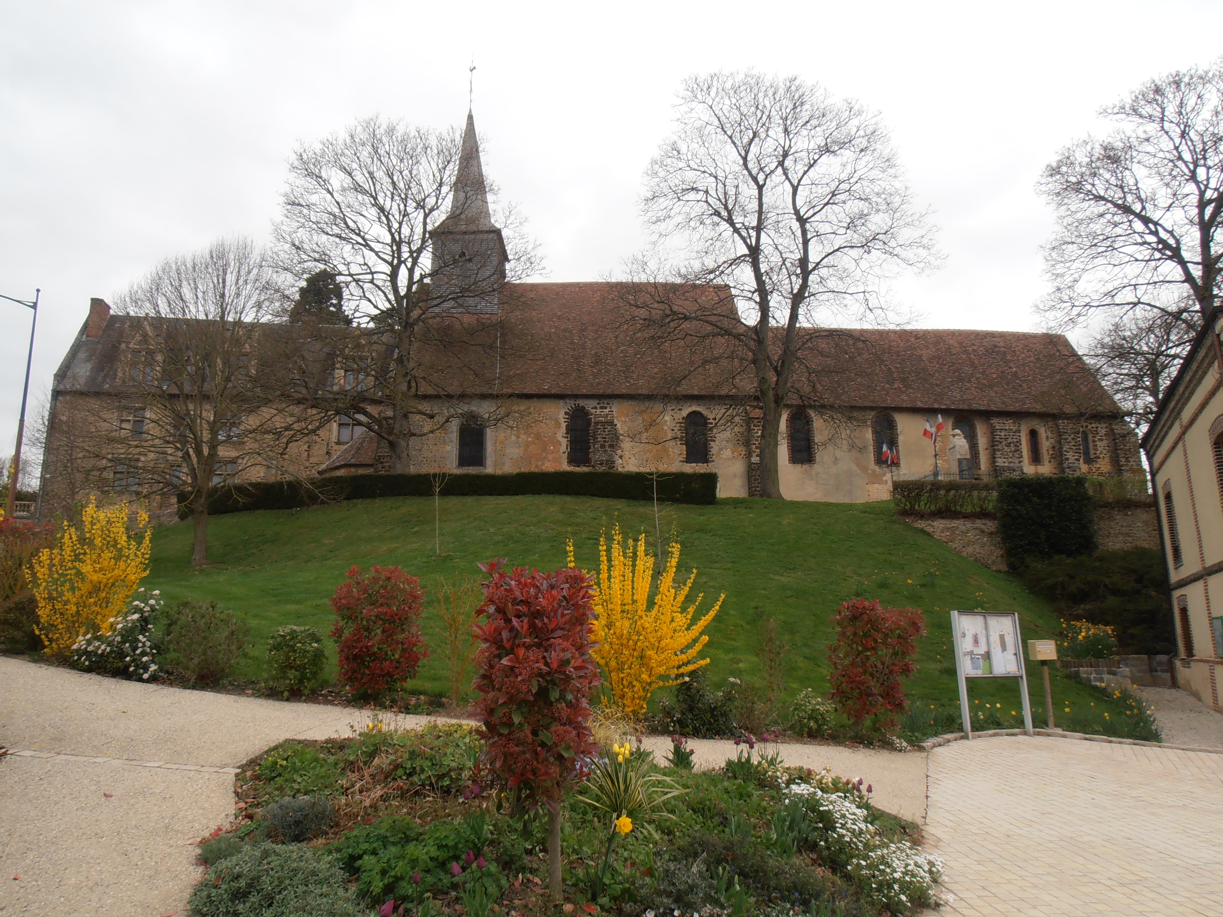 Orne, Saint-Michel-sur-Risle, Eglise et le prieuré de style renaissance L'église fut érigée fin XIIe - début XIIIe siècle à l'emplacement d'une chapelle funéraire construite vers 1100 par les Seigneurs de l'Aigle. Elle a conservé deux vitraux classés au titre des monuments historiques, datant des années 1225-1250 déplacés dans la nef en 1906, une dalle funéraire du XIIIe siècle et du mobilier du XVIIIe sècle. Des fresques du XIVe siècle ont été mises au jour en 1996. Elles ornent les murs nord et ouest de l'église et représentent la Jerusalem céleste et seraient les plus anciennes de Normandie (sources : panneau signalétique près de l'église)